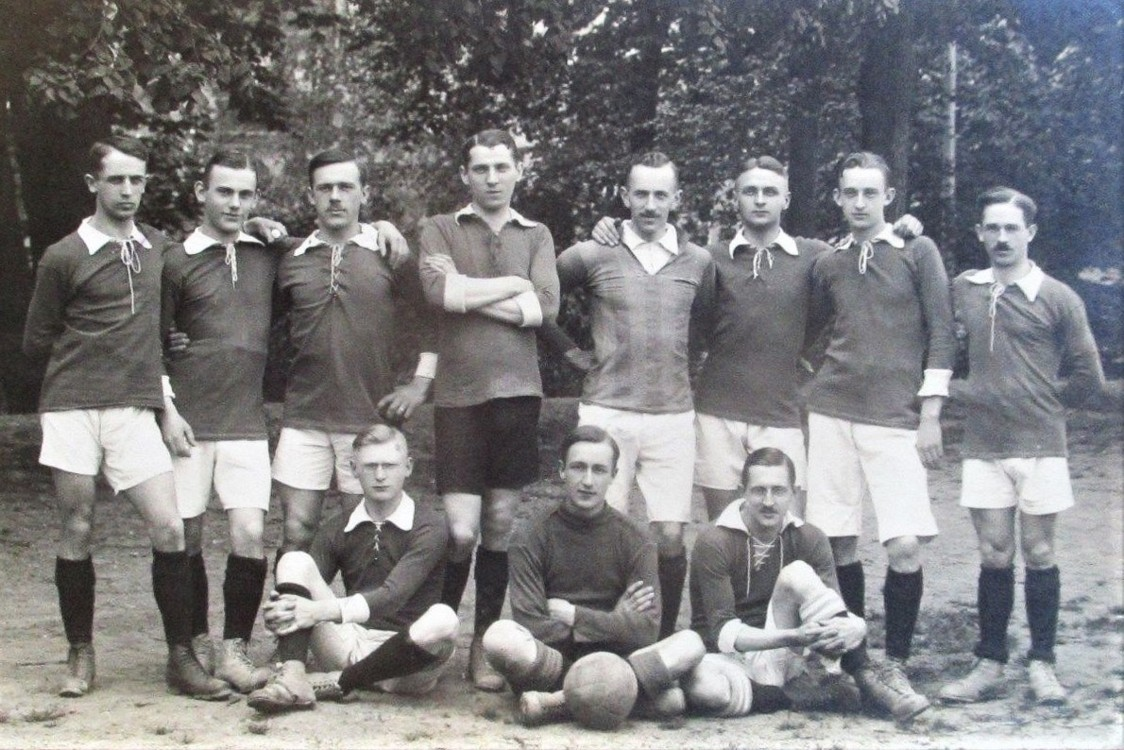 Fußballmannschaft des SC Meiningen 04 im Jahr 1918 (heute VfL Meiningen 04).